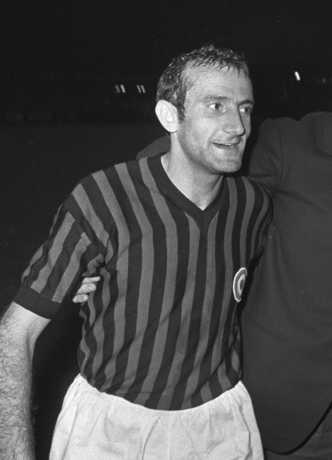 1967-68 UEFA Cup Winners' Cup final in Rotterdam, AC Milan vs Hamburger SV. AC Milan midfielder Giovanni Lodetti.